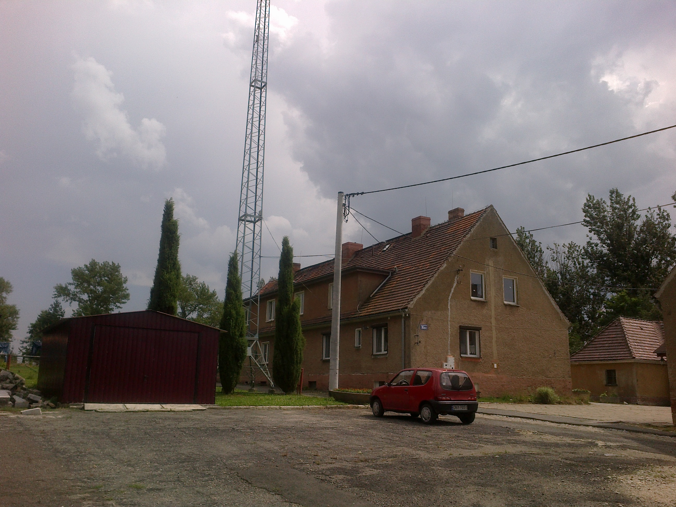 Gierałcice, była Strażnica Wojsk Ochrony Pogranicza (WOP) Gierałcice, następnie Strażnica Straży Granicznej (SG). Obecnie budynki mieszkalne